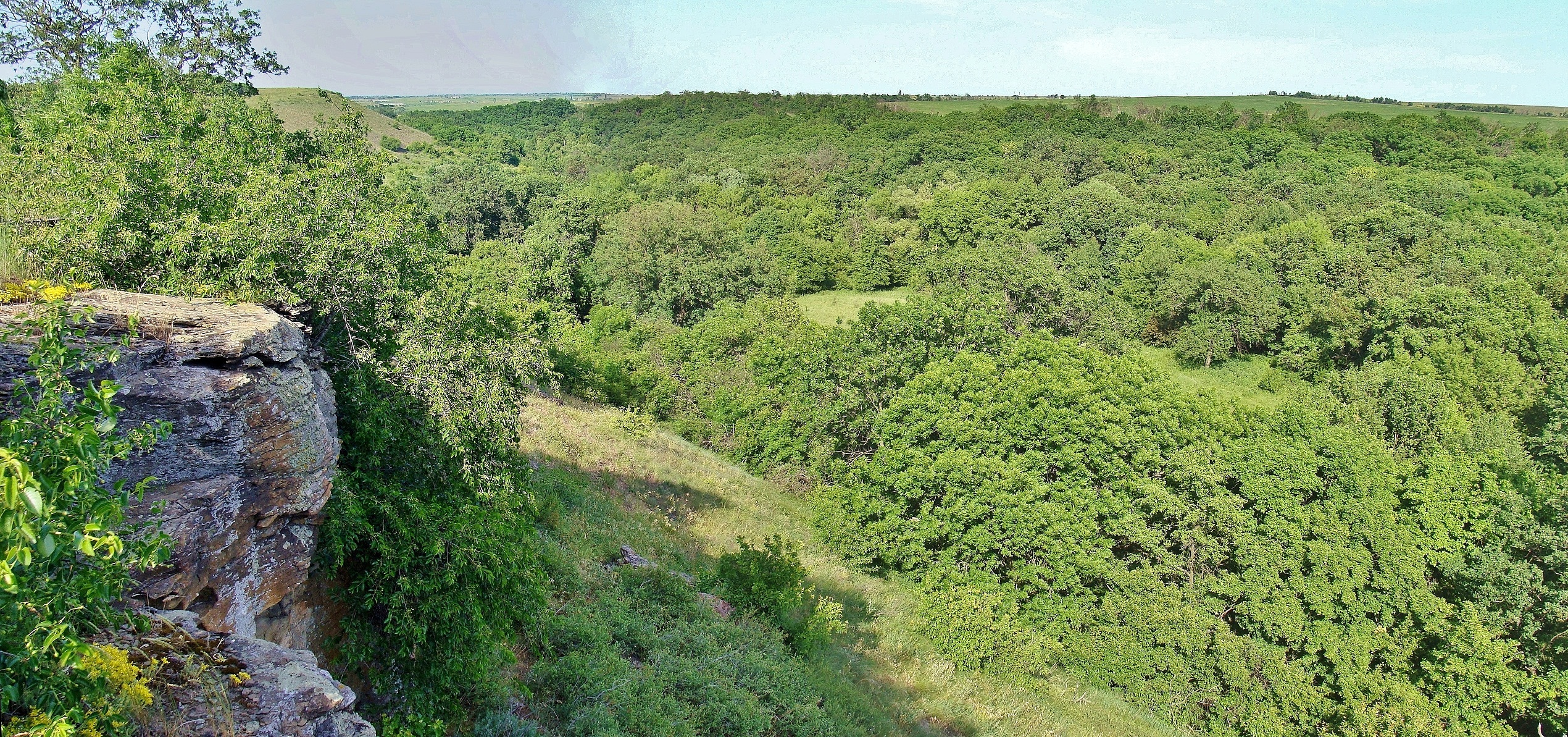 Внизу.